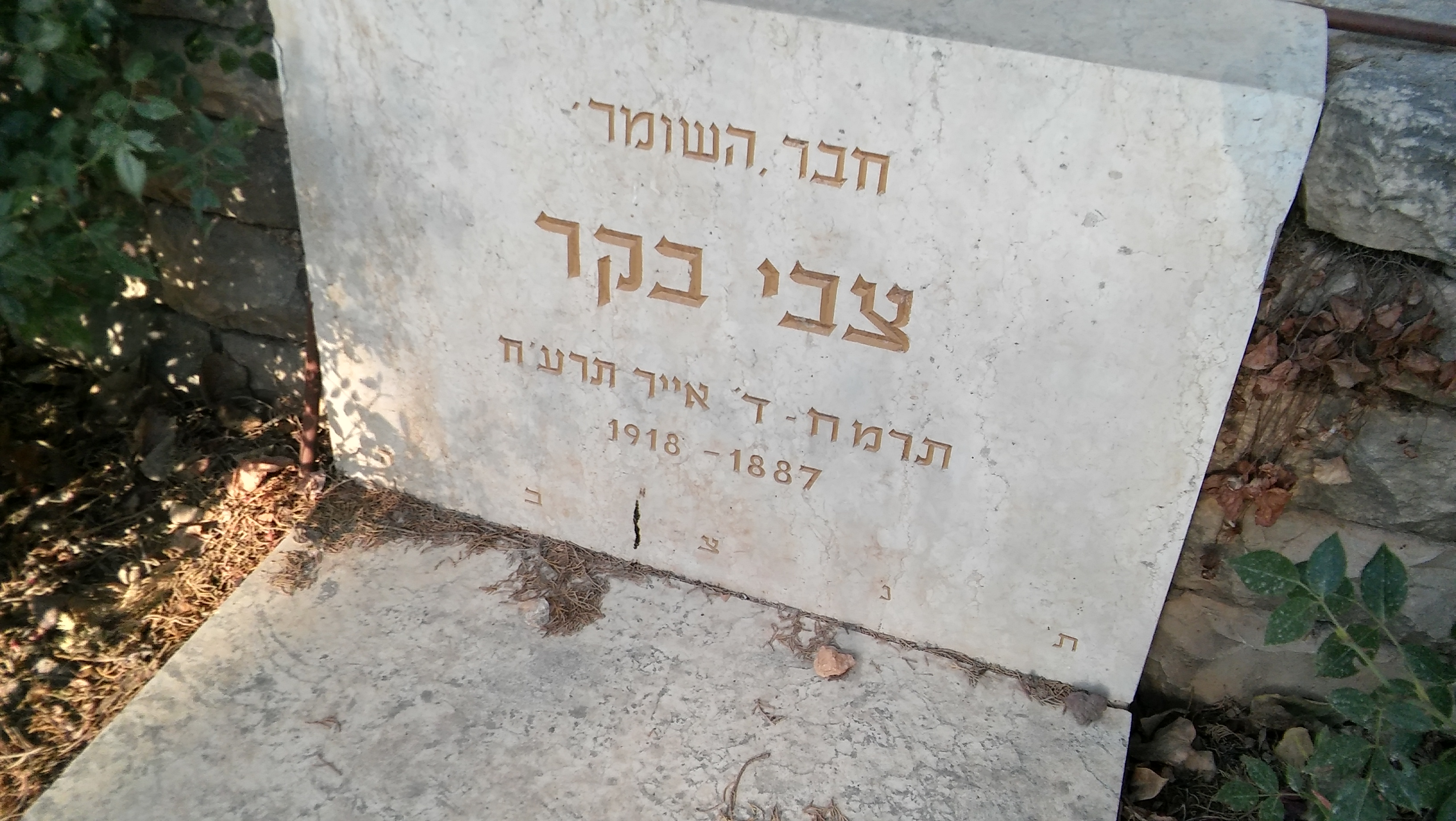 קברו של צבי בקר בחלקת השומר בבית הקברות של כפר גלעדי